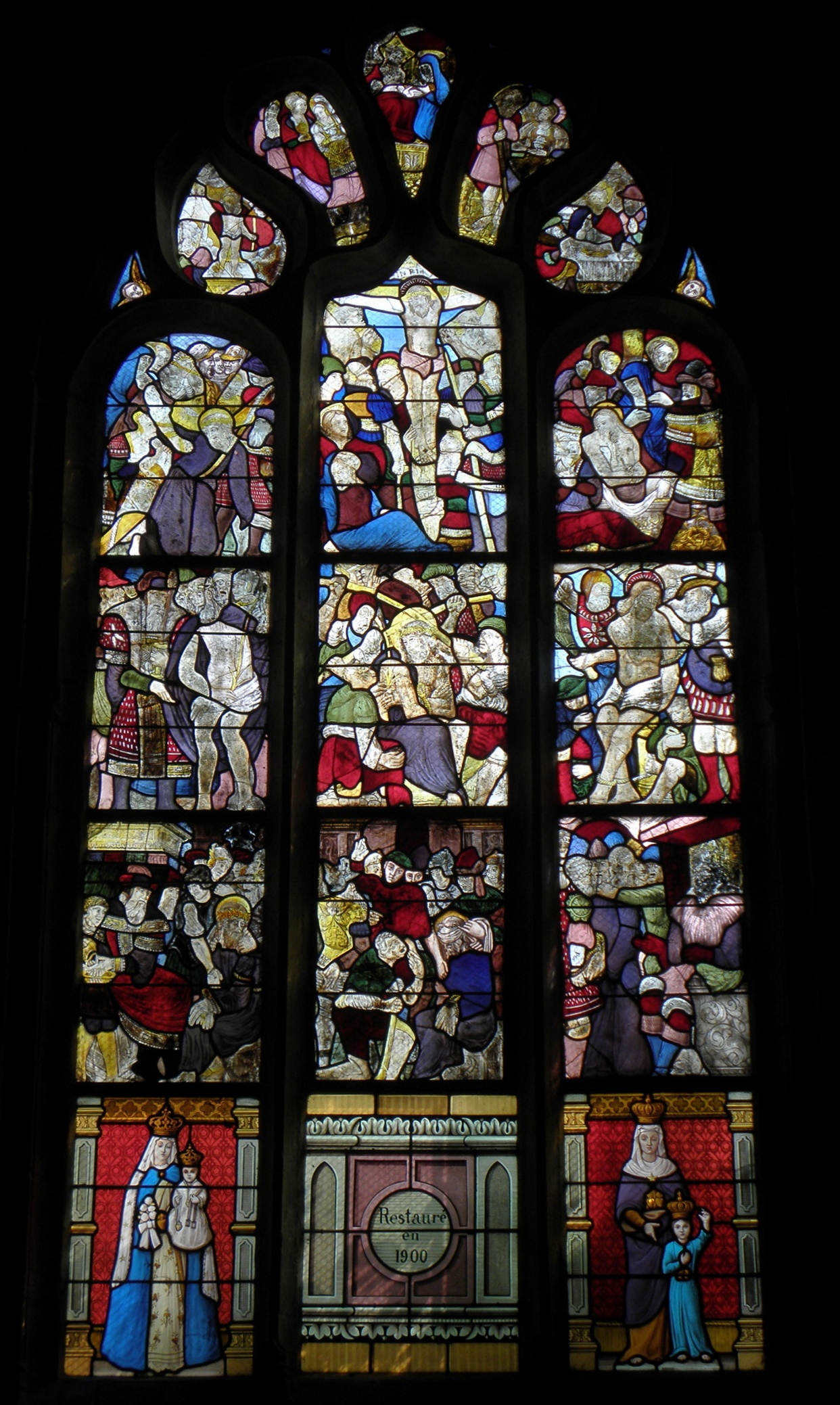 Maîtresse-vitre de Magoar (22).